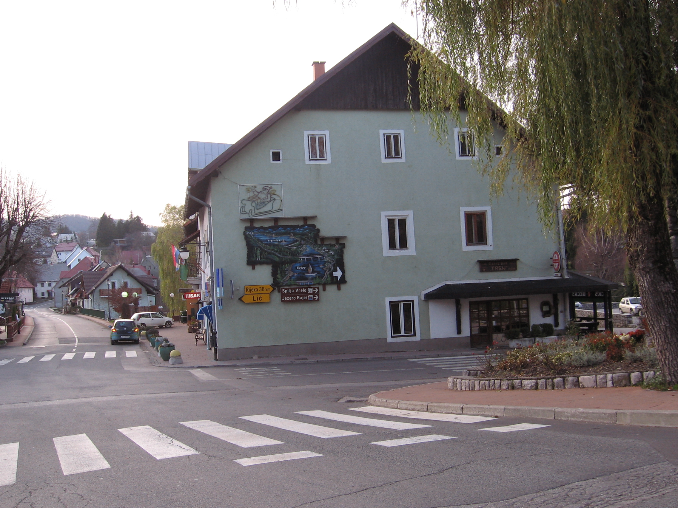 Fužine